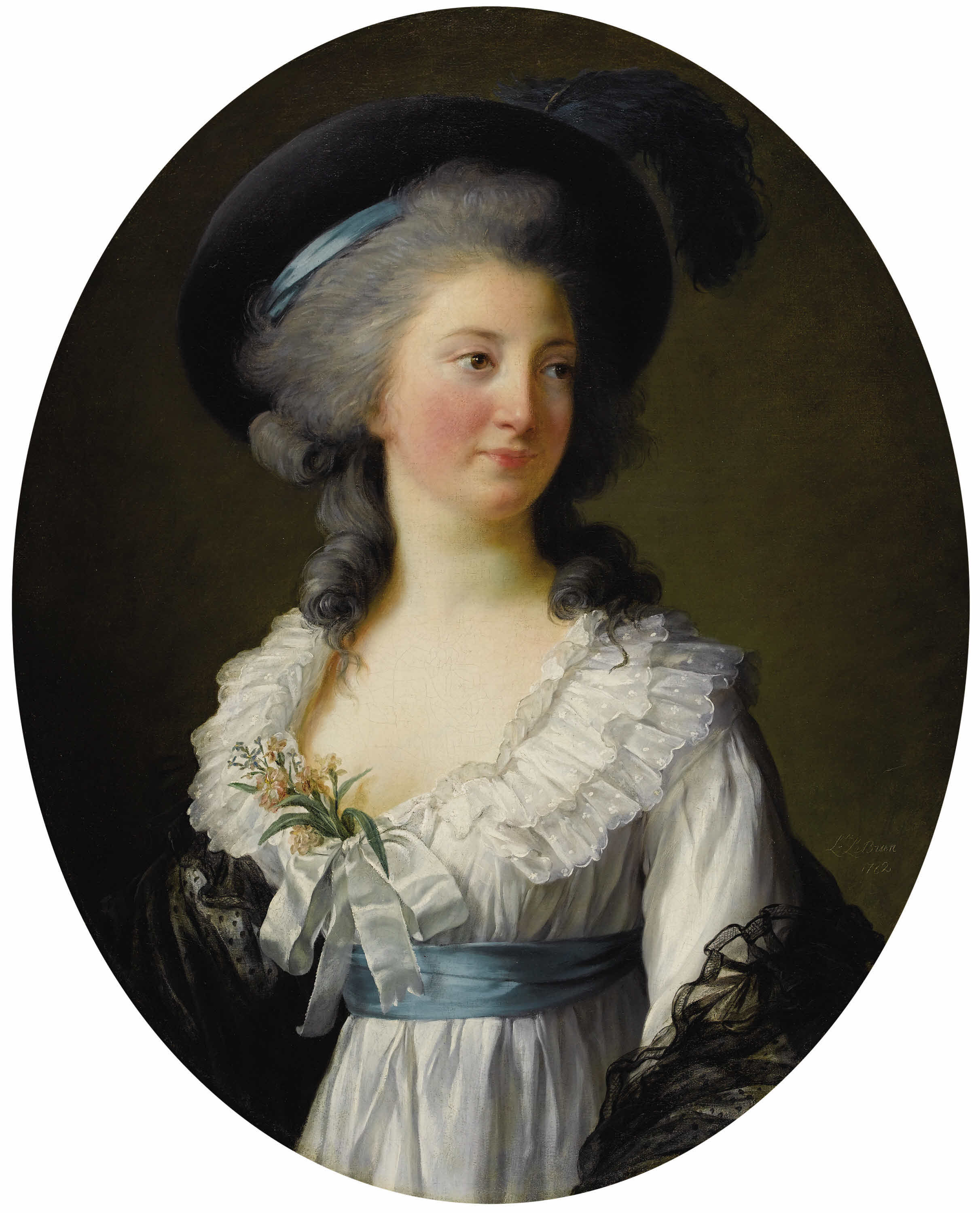 Marie-Elisabeth Olive (née Frottier de la Coste-Messeliére), Comtesse de Moreton de Chabrillon (1761-1807)